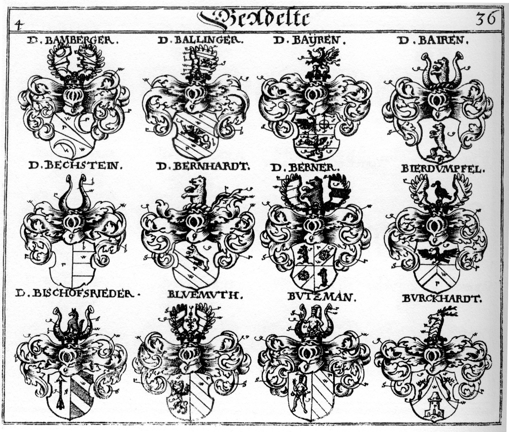 Siebmachers Wappenbuch, Tafeln der 9. Ausgabe 1701 und der 10. Ausgabe 1705, nach dem Faksimile von 1975. Tafel aus Teil 4. Beadelte.